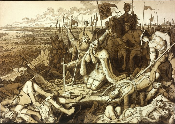 Feder- und Pinselzeichnung in Braun, laviert, mit Weißhöhungen von Karl Ruß. Blatt 39 aus dem Zyklus „Bilder zur Geschichte von Wien“. Die 149 Zeichnungen entstanden zwischen 27. Jänner 1826 und 12. Dezember 1832.